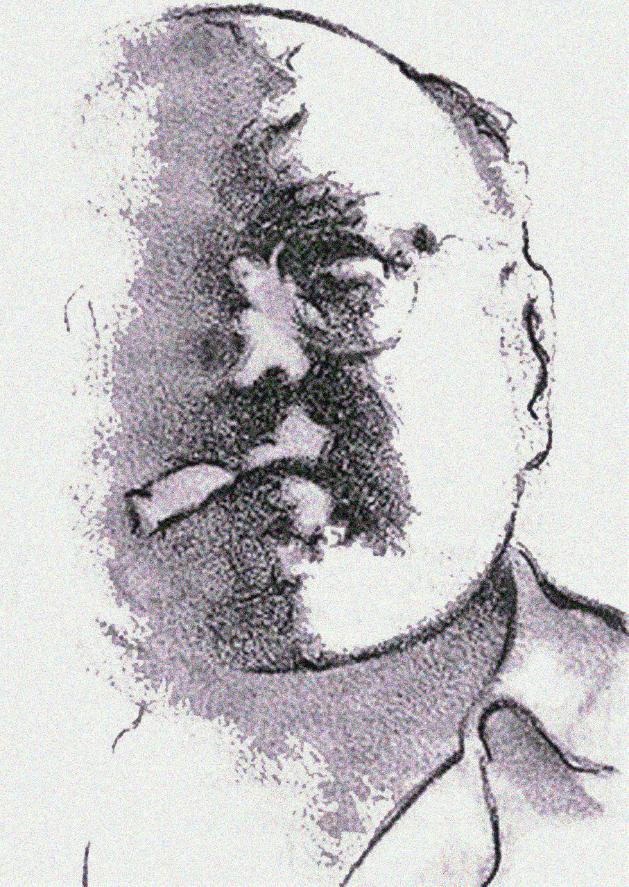 Miguel Pérez Reviriego. Retrato de Guillermo Silveira, 1995. Lápiz sobre papel. Publicado en Pérez Reviriego, Miguel (1996). Cien artistas de Extremadura. Badajoz: Carisma Libros. p. 156. ISBN 8488964110. Reproducido en Saavedra Campos, Fernando [coord.] (2014). Guillermo Silveira García (Segura de León, 1922-Badajoz, 1987): colección de láminas. Badajoz: Ayuntamiento de Fregenal de la Sierra / Ayuntamiento de Segura de León / Diputación Provincial. s. p. Imagen de cubierta. Guillermo Silveira García (1922–1987) Description painter, sculptor, military personnel and art educatorDate of birth/death 11 January 1922 11 May 1987Location of birth/death Segura de León BadajozWork periodcirca 1945-1987Work location BadajozAuthority control : Q5888937 VIAF: 100940319 ISNI: 0000 0000 7827 0108 GND: 139488154 BNE: XX4841676 creator QS:P170,Q5888937